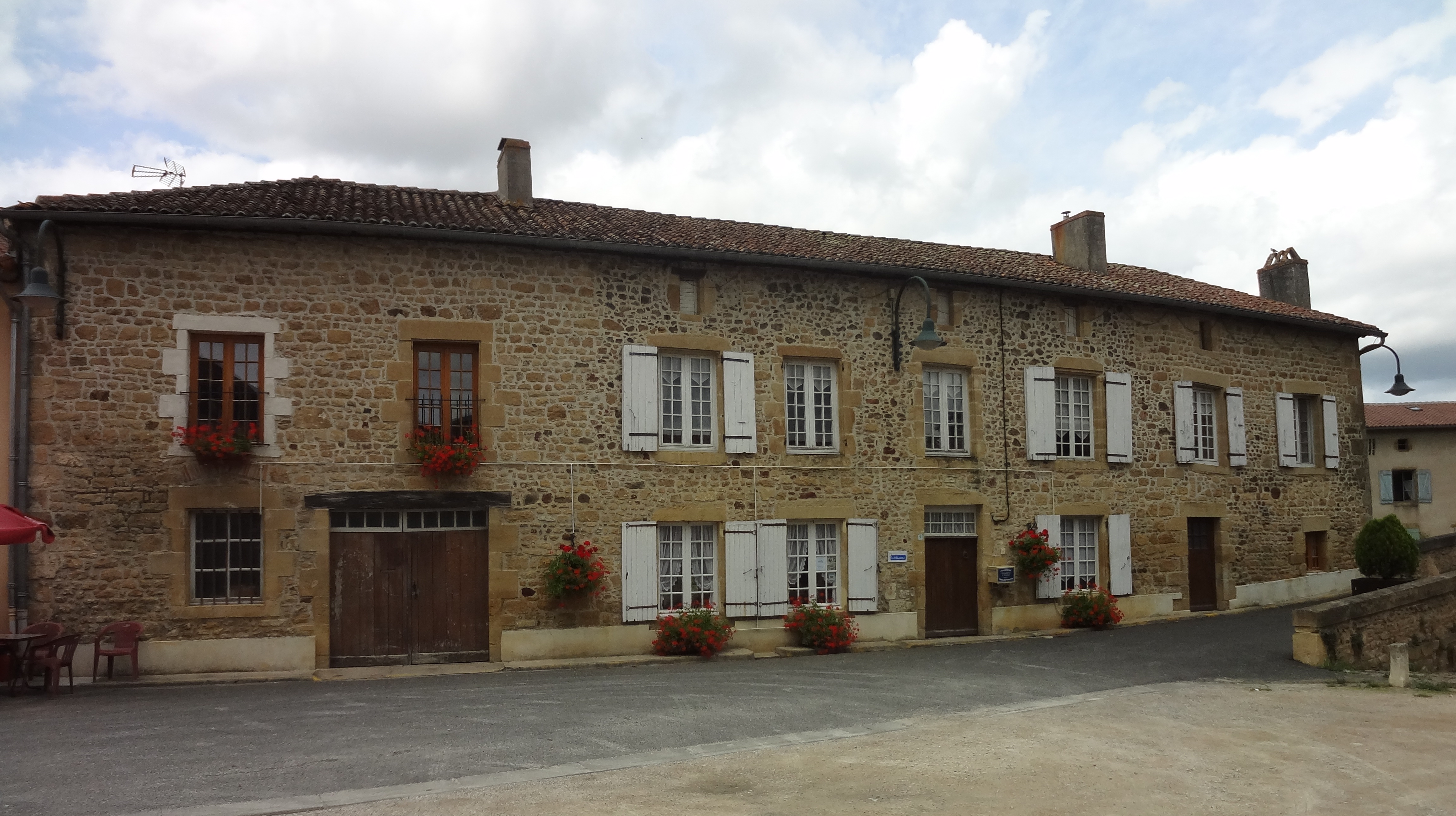 Ancienne gendarmerie, située au débouché du pont de la route nationale